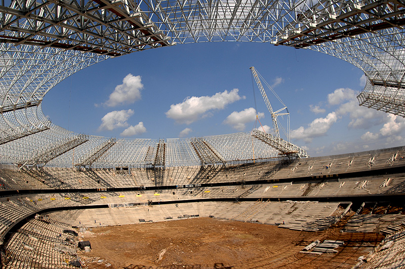 Donbass Arena 2008